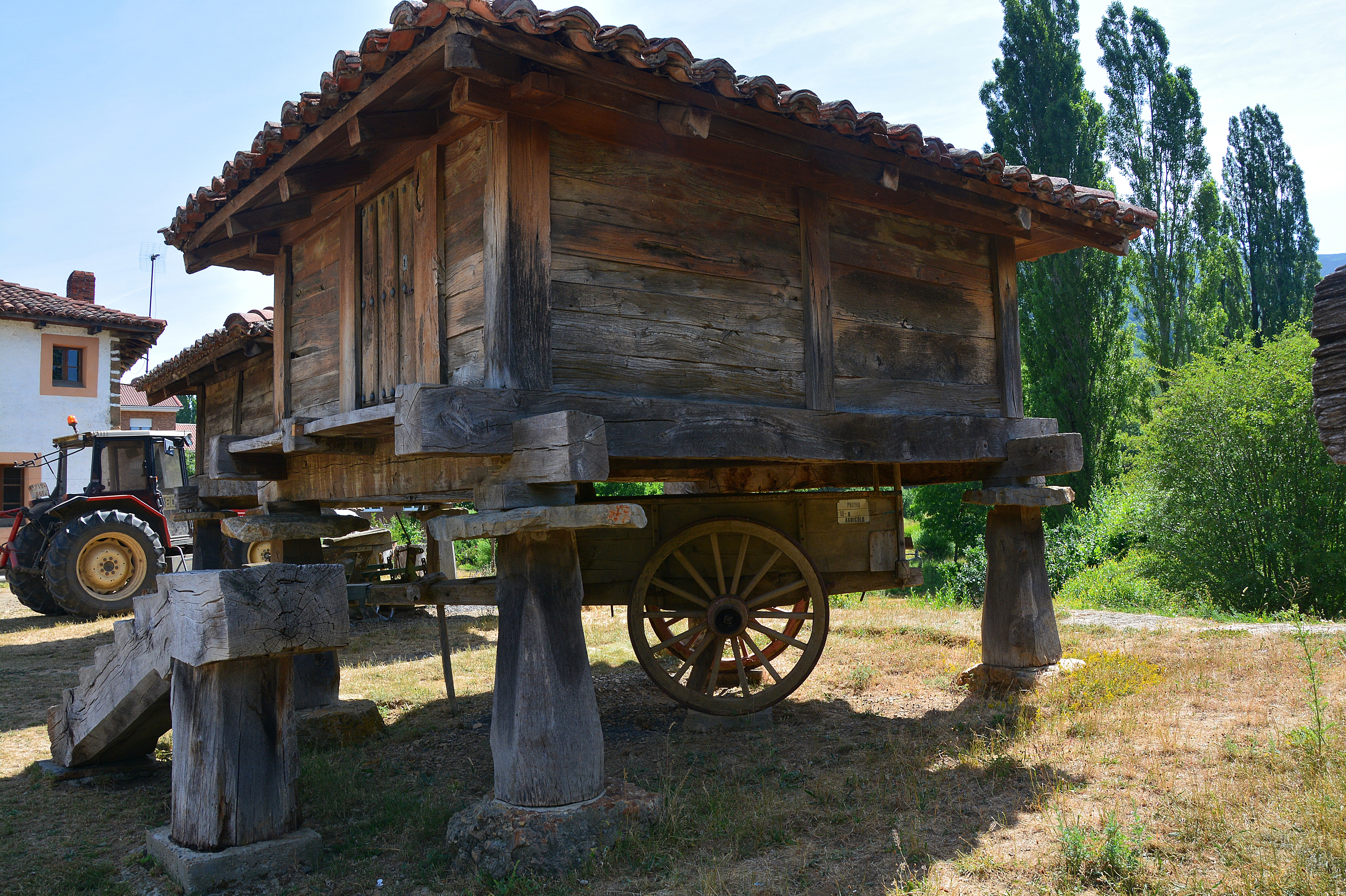 Hórreos en Prioro, León, España.